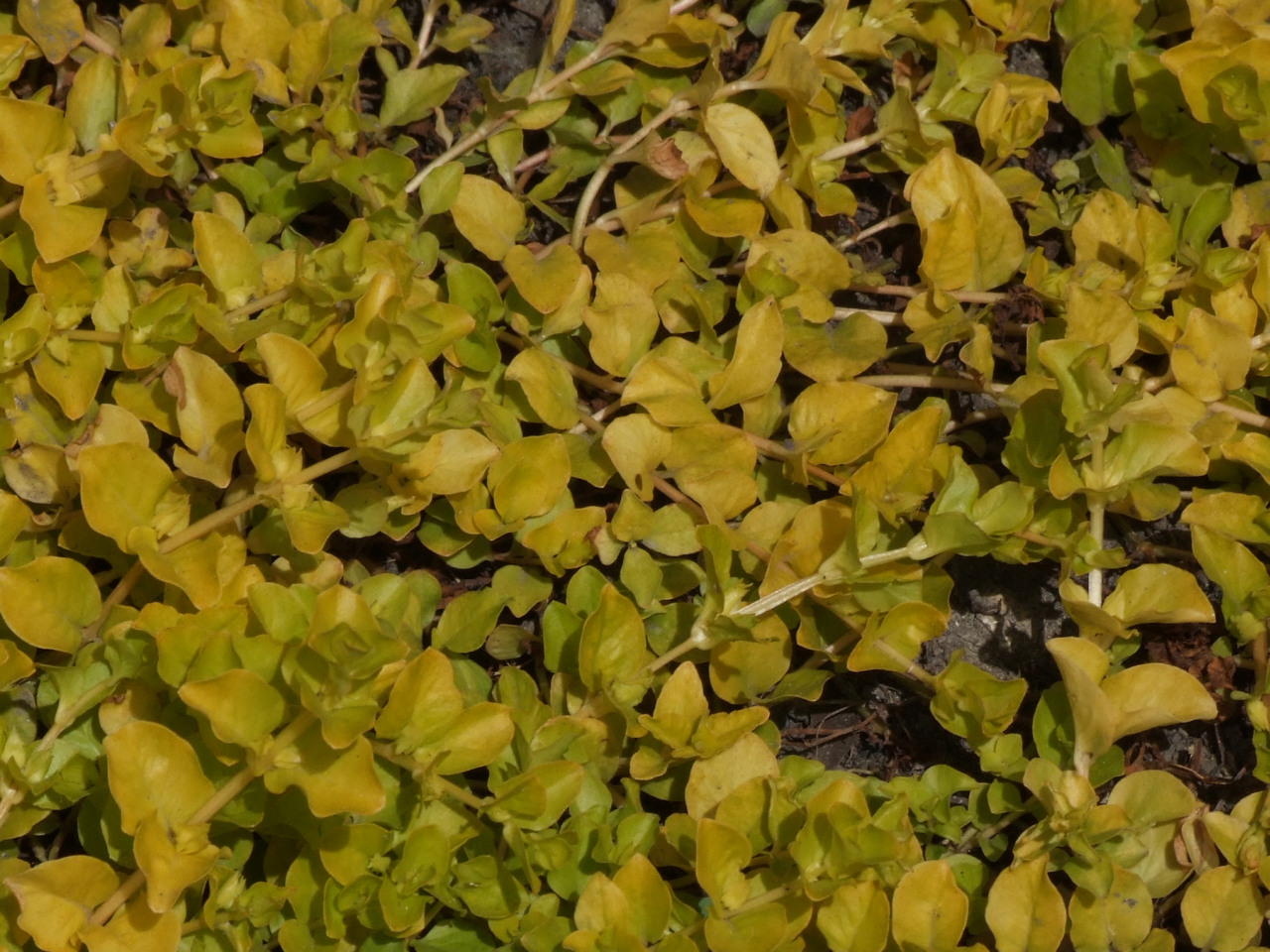 Lysimachia nummularia 'Aurea'